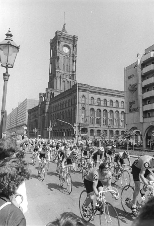 Friedensfahrt, Berlin, Rotes Rathaus ADN-ZB Kasper 9.5.87-min-Berlin: 40. Internationale Friedensfahrt - 1. Etappe: Rund in Berlin über 108 km-Das Feld der 156 Fahrer auf der zweiten der insgesamt acht Runden am Marx-Engels-Forum. Im Hintergrund rechts das Rote Rathaus.